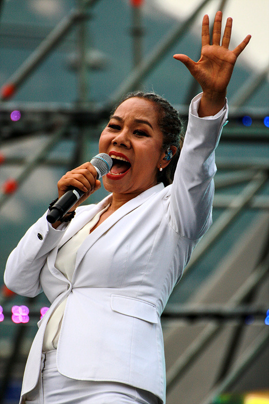 170819 도심속 봅슬레이